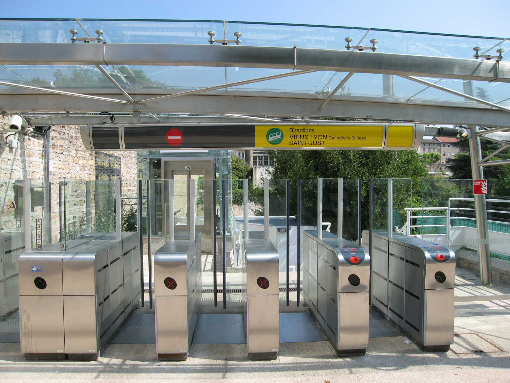 Entrée de la station des théâtres romains du funiculaire de Saint Just. Lyon, France